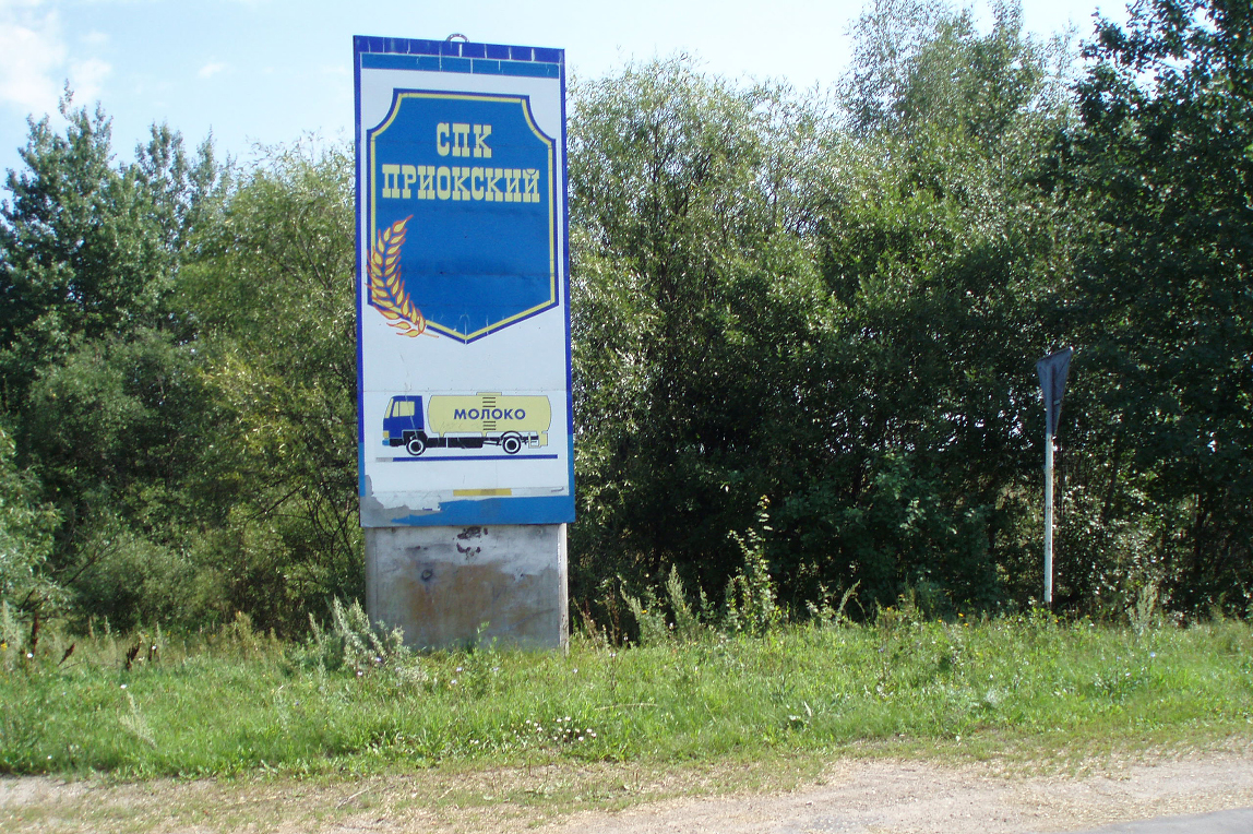 Информационный знак СПК Приокский, село Польцо, Муромский район Владимирской области.